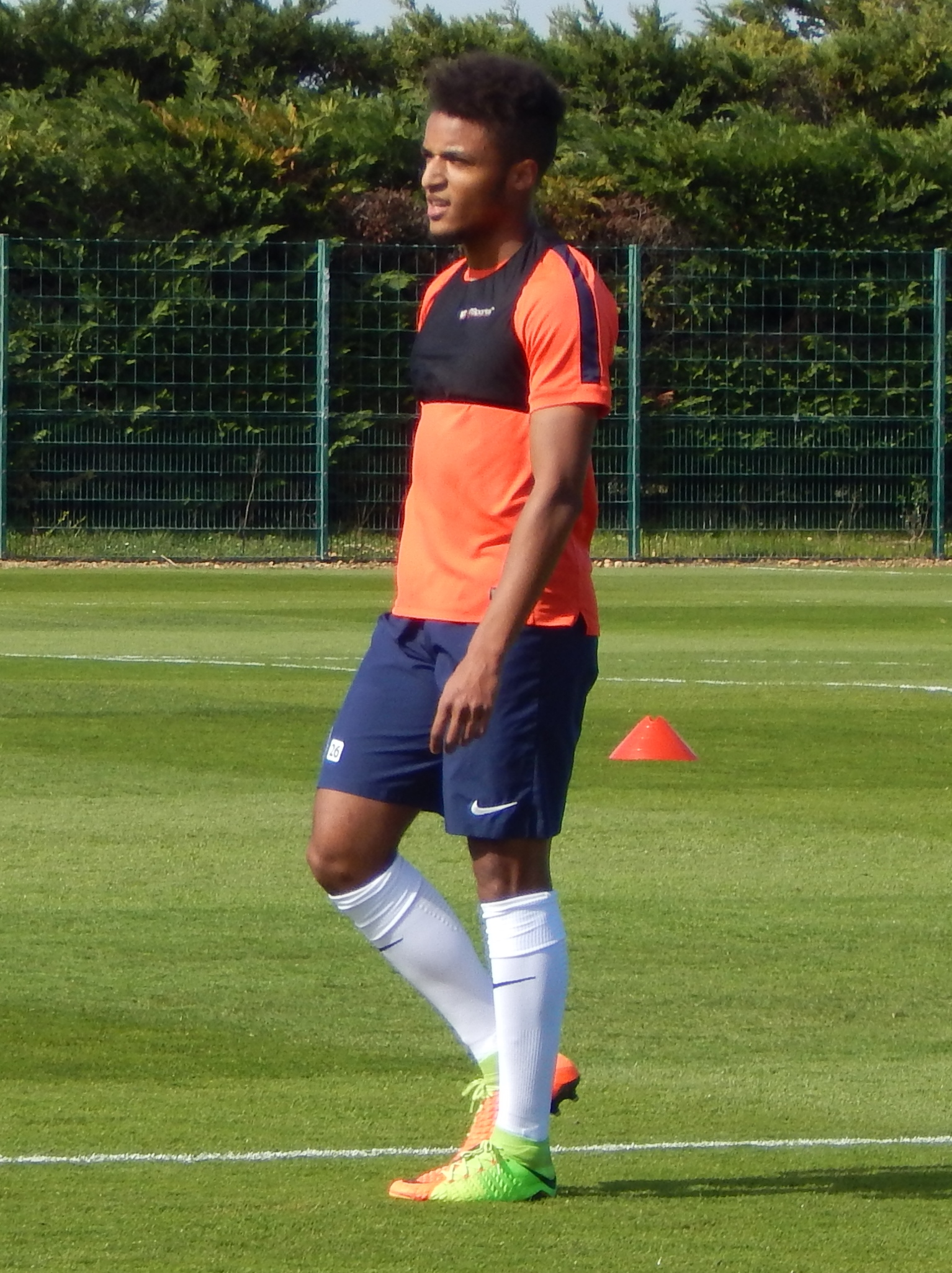 Morgan Poaty, 2017.